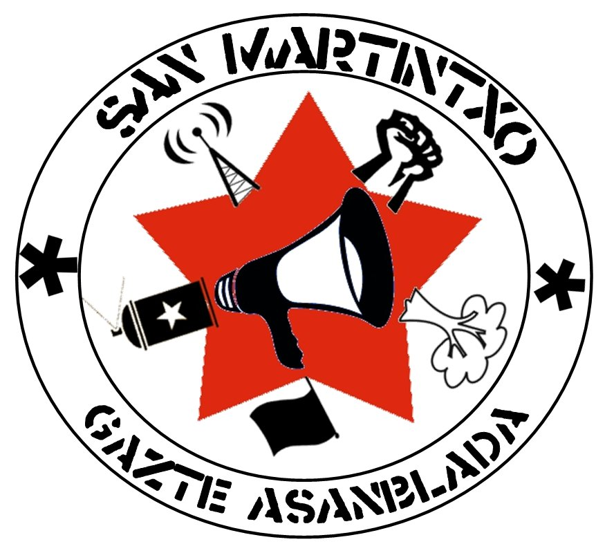 San Martintxo Gazte Asanbladaren logotipoa